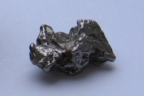 Eisenmeteorit: Found 1576, Gran Chaco Gualamba, Chaco, Argentinien - Alter: 4000 bis 6000 Jahre